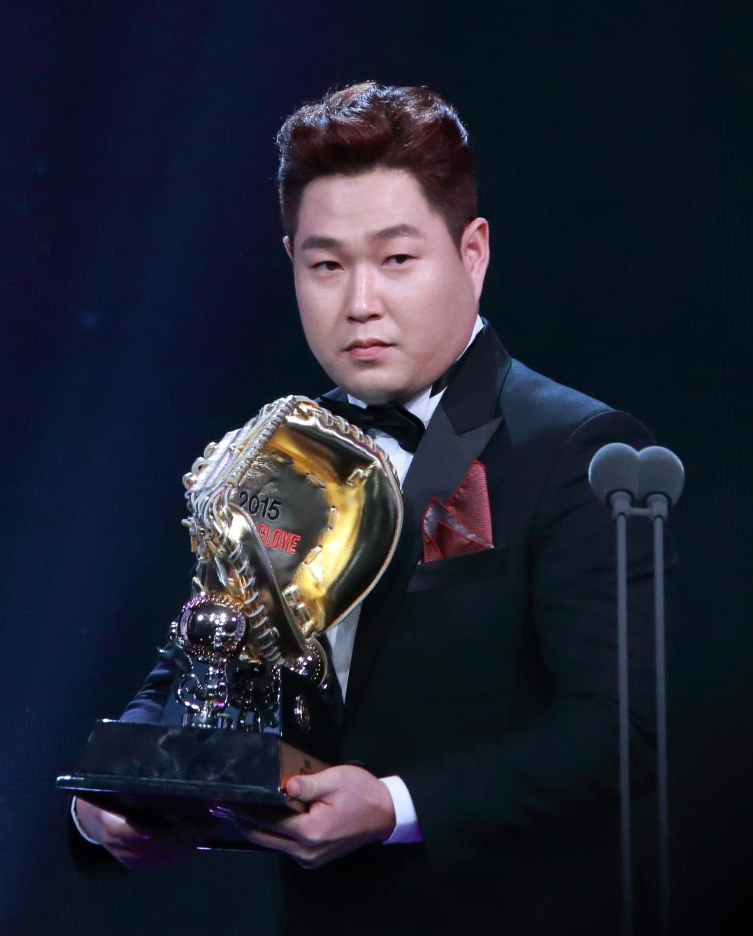 양의지 151208. 2015 KBO 골든 글러브 시상식